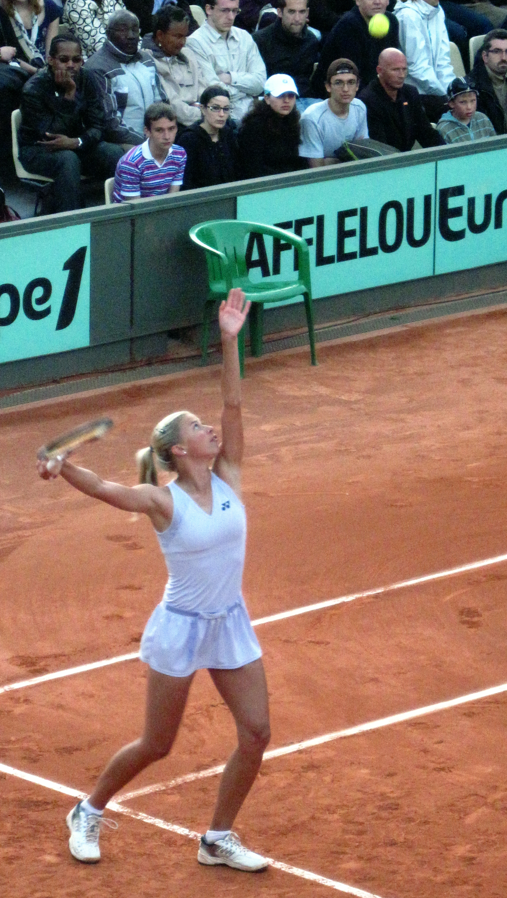 Andrea Hlavackova